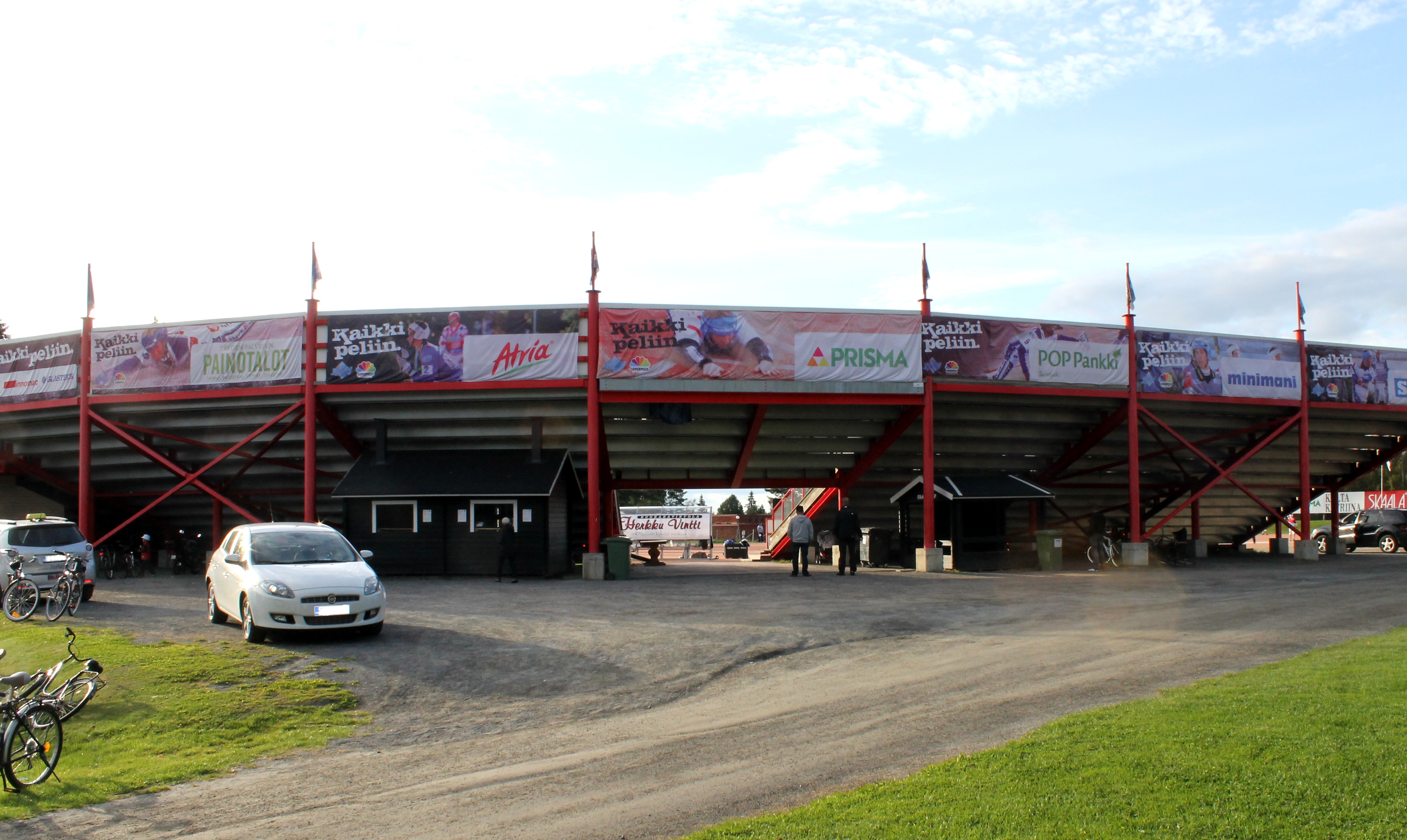 Nurmon pesäpallostadion, Skaala-areena, kesällä 2012